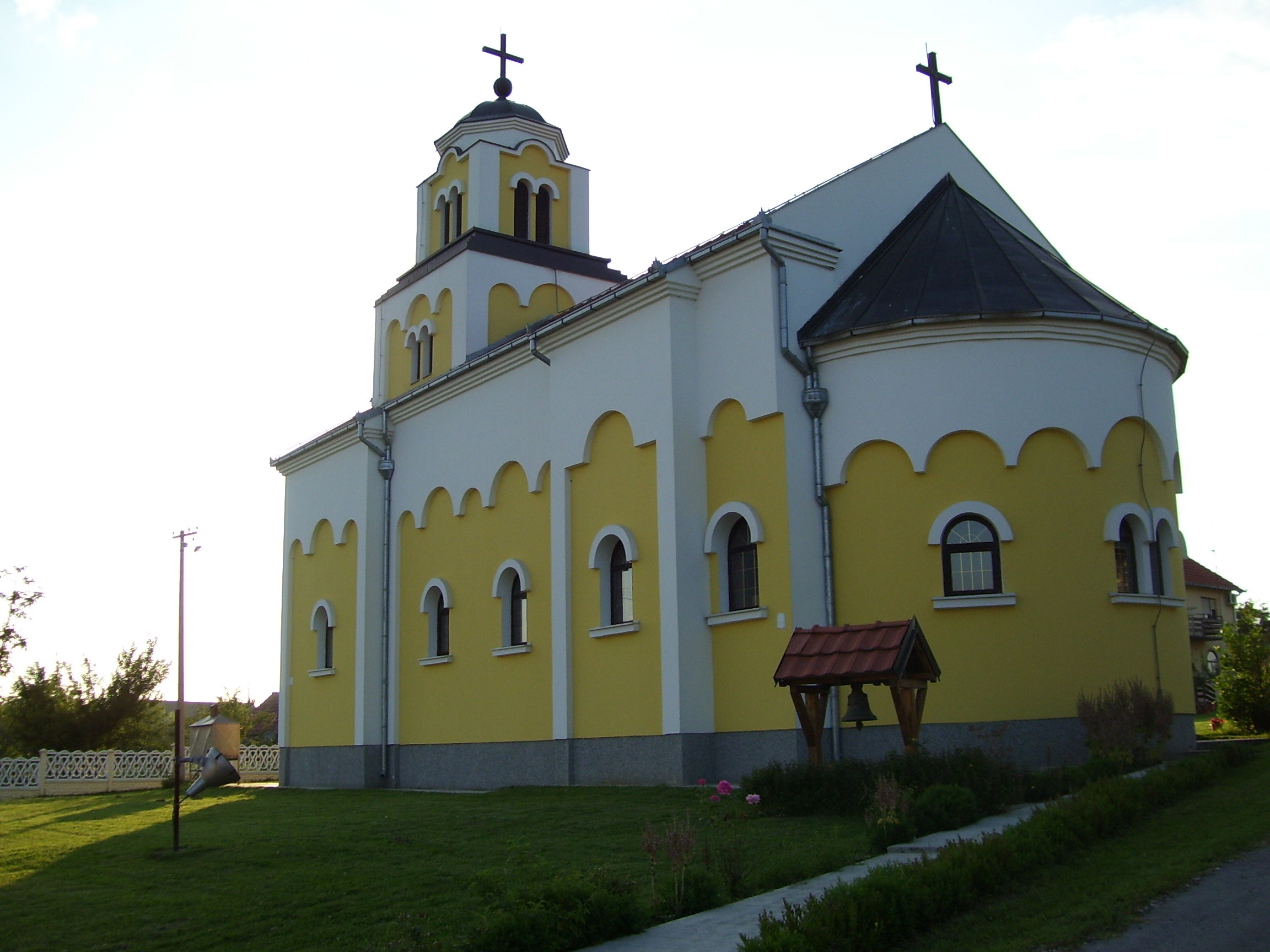 Аутор слике је корисник:SRB Maric IT Слика је урађена обичним фотоапаратом. Датум: 10-07-2010.)